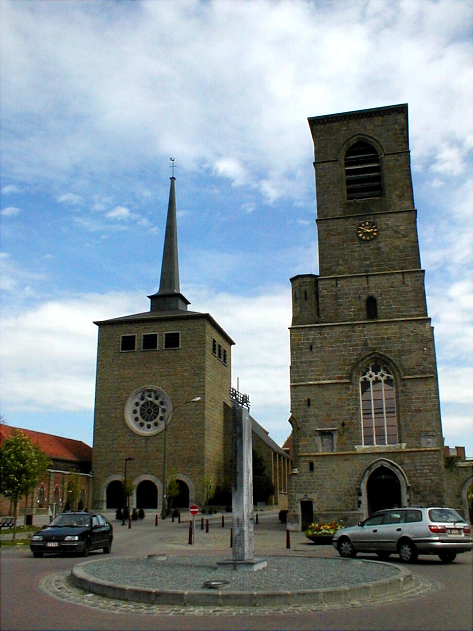 St Ghislain la place